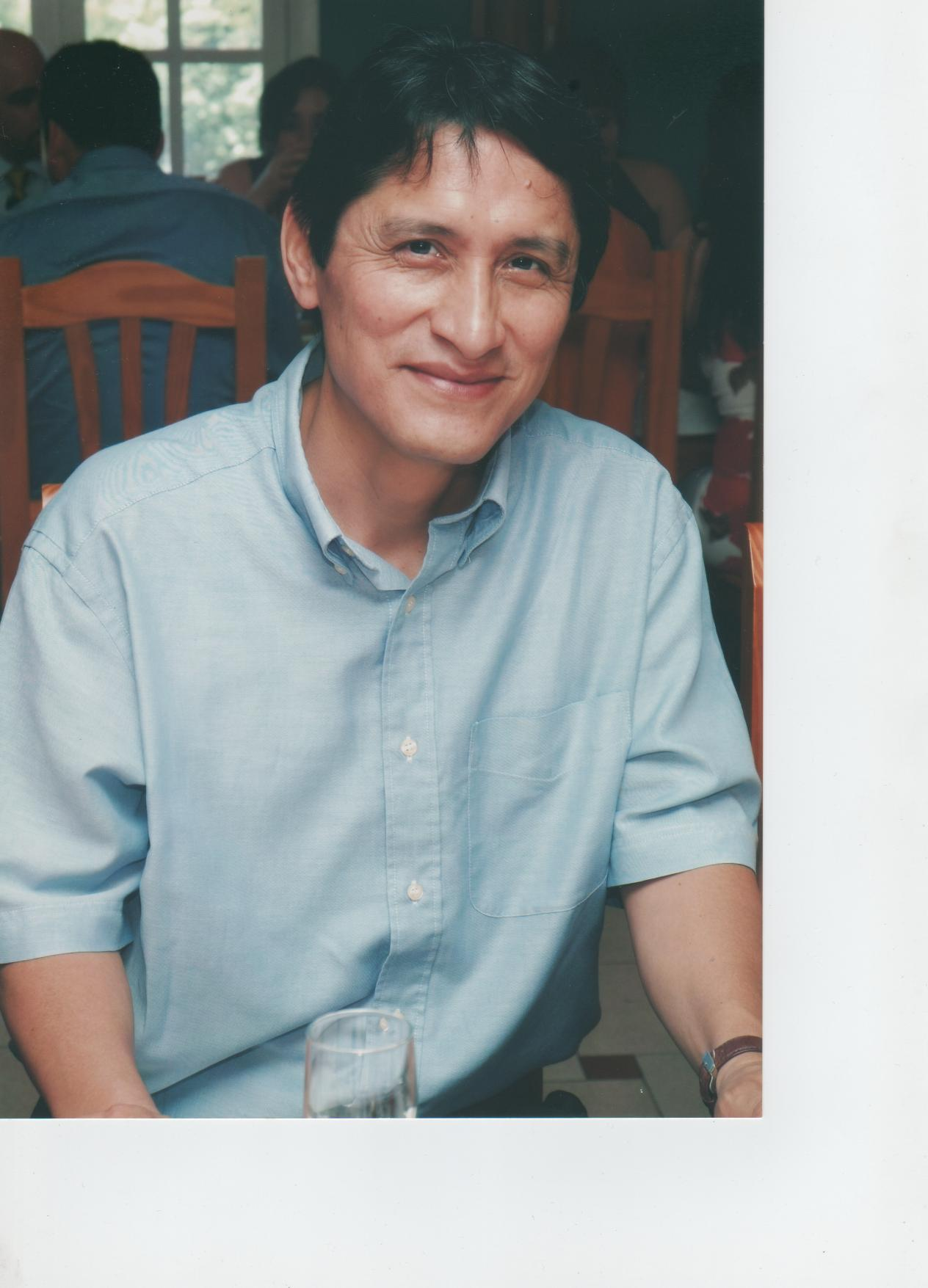 Foto de Jorge Varas Vásquez